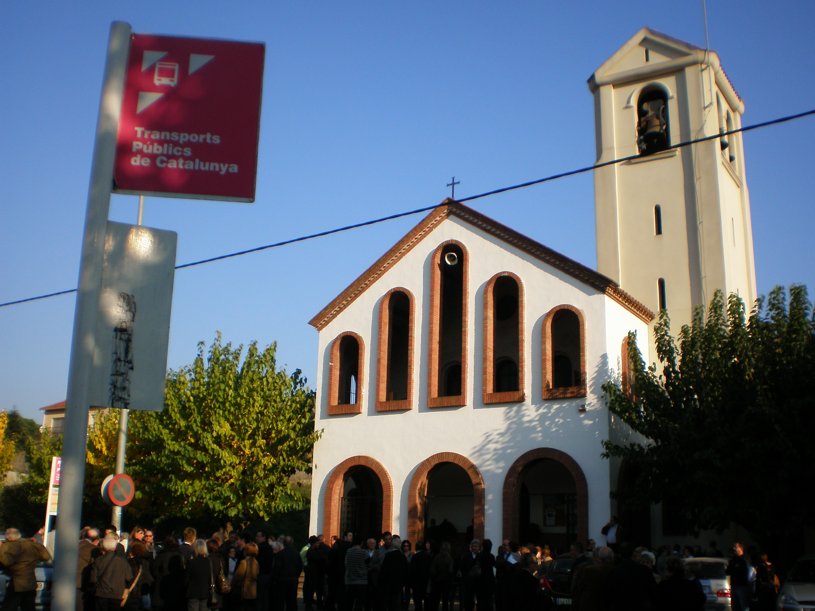 Iglesia de Sant Fost de Campsentelles.